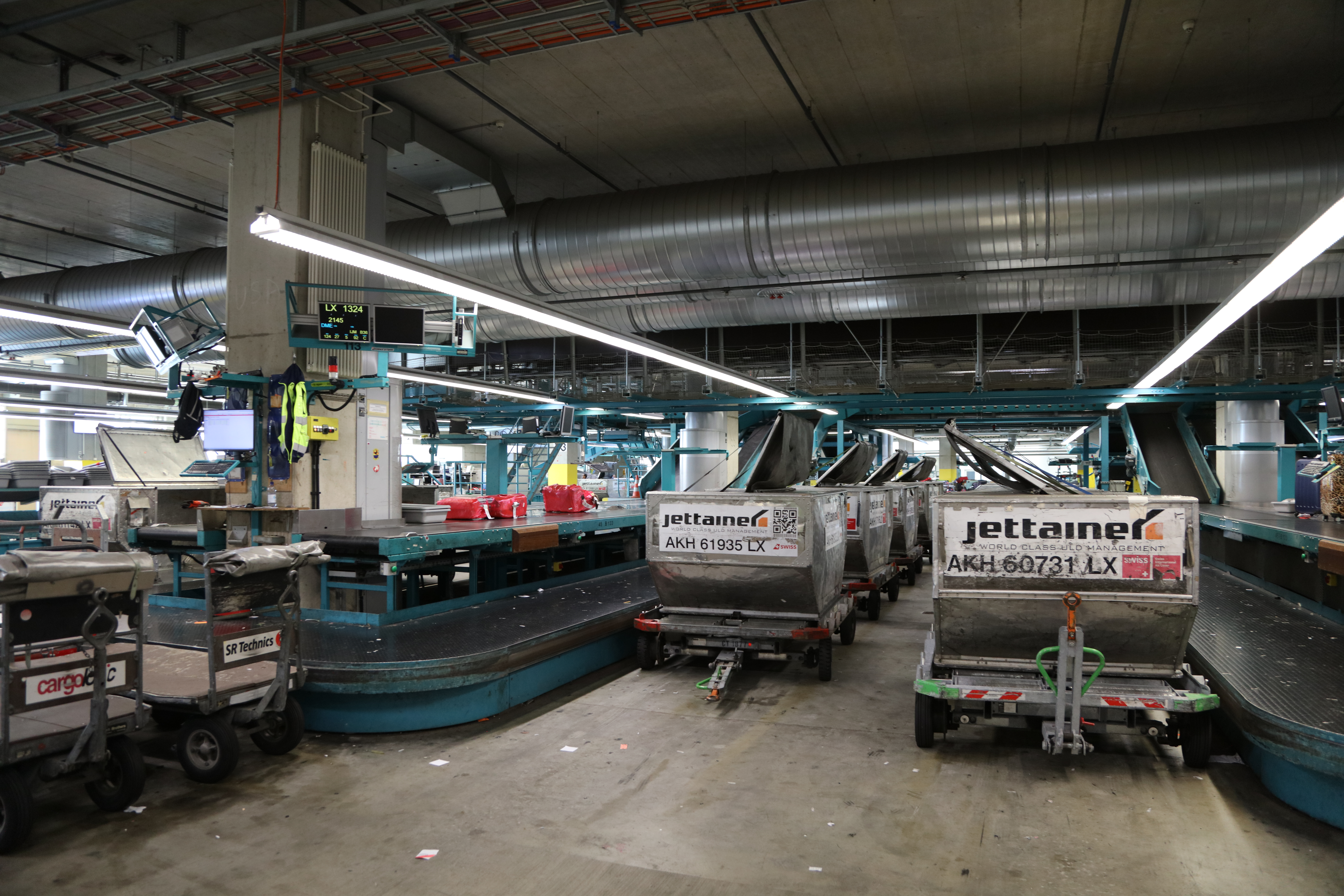 Die Gepäckanlage im Flughafen Zürich